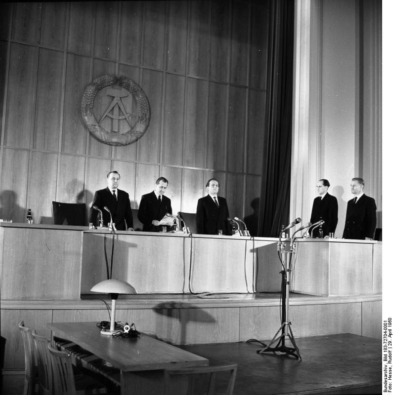 Berlin, Oberländer-Prozess Zentralbild/Hesse 29.4.1960 Oberländer-Prozeß in Berlin Das Oberste Gericht der DDR hat den Bonner Minister Oberländer zu lebenslänglichem Zuchthaus verurteilt. Die Urteilsverkündung erfolgte am 29.4.1960 nach sieben Verhandlungstagen. U.B.z.: Im Namen des Volkes verkündete Gerichtsvorsitzender Dr. Jahn (2.v.l.) das Urteil